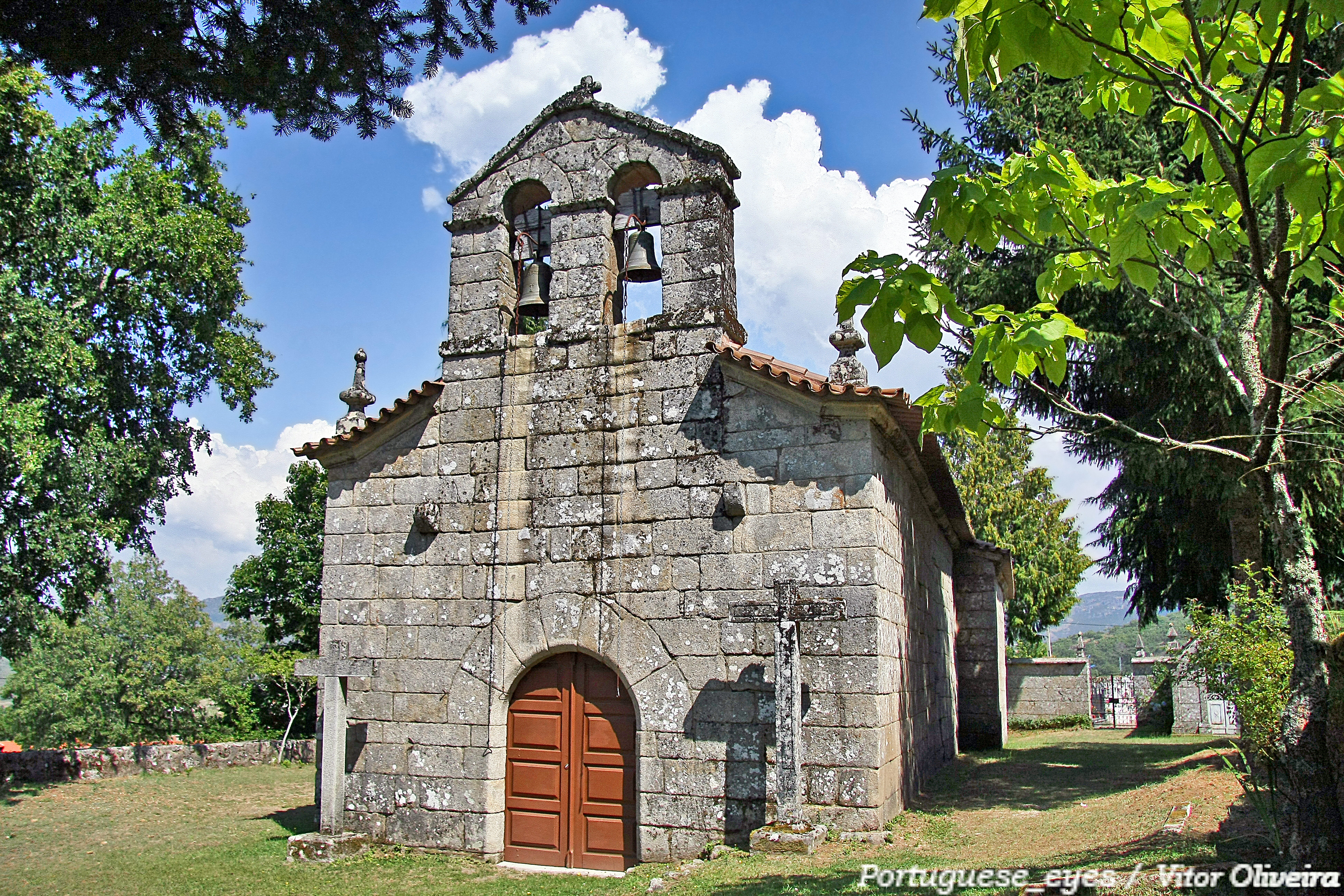 Tourém - Portugal